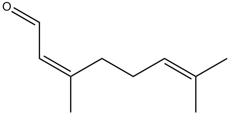 Tsitraal B ehk neraal.